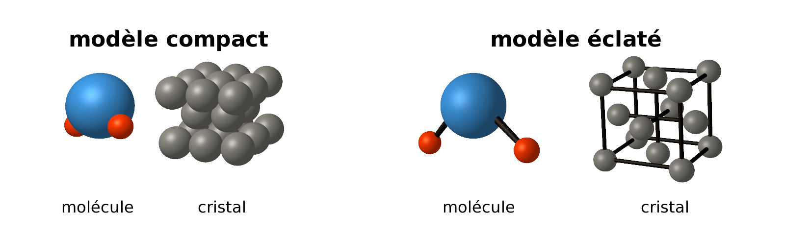 Version 3D de Image:Atome spheredure.png